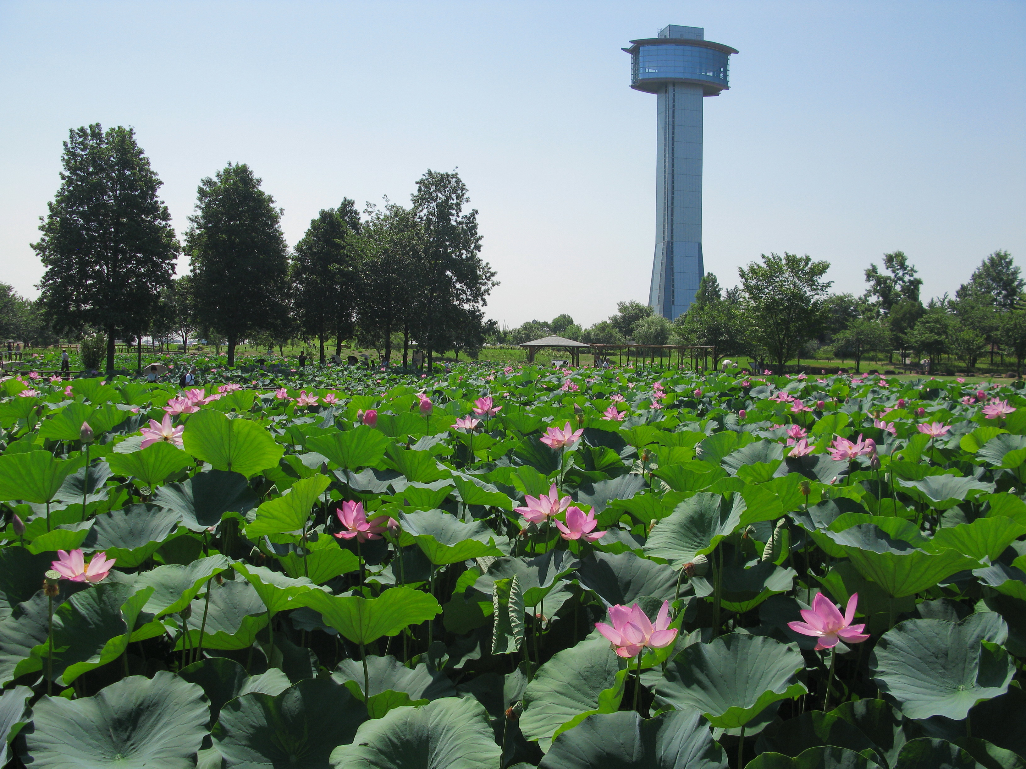 古代蓮の里の古代蓮池（埼玉県行田市）